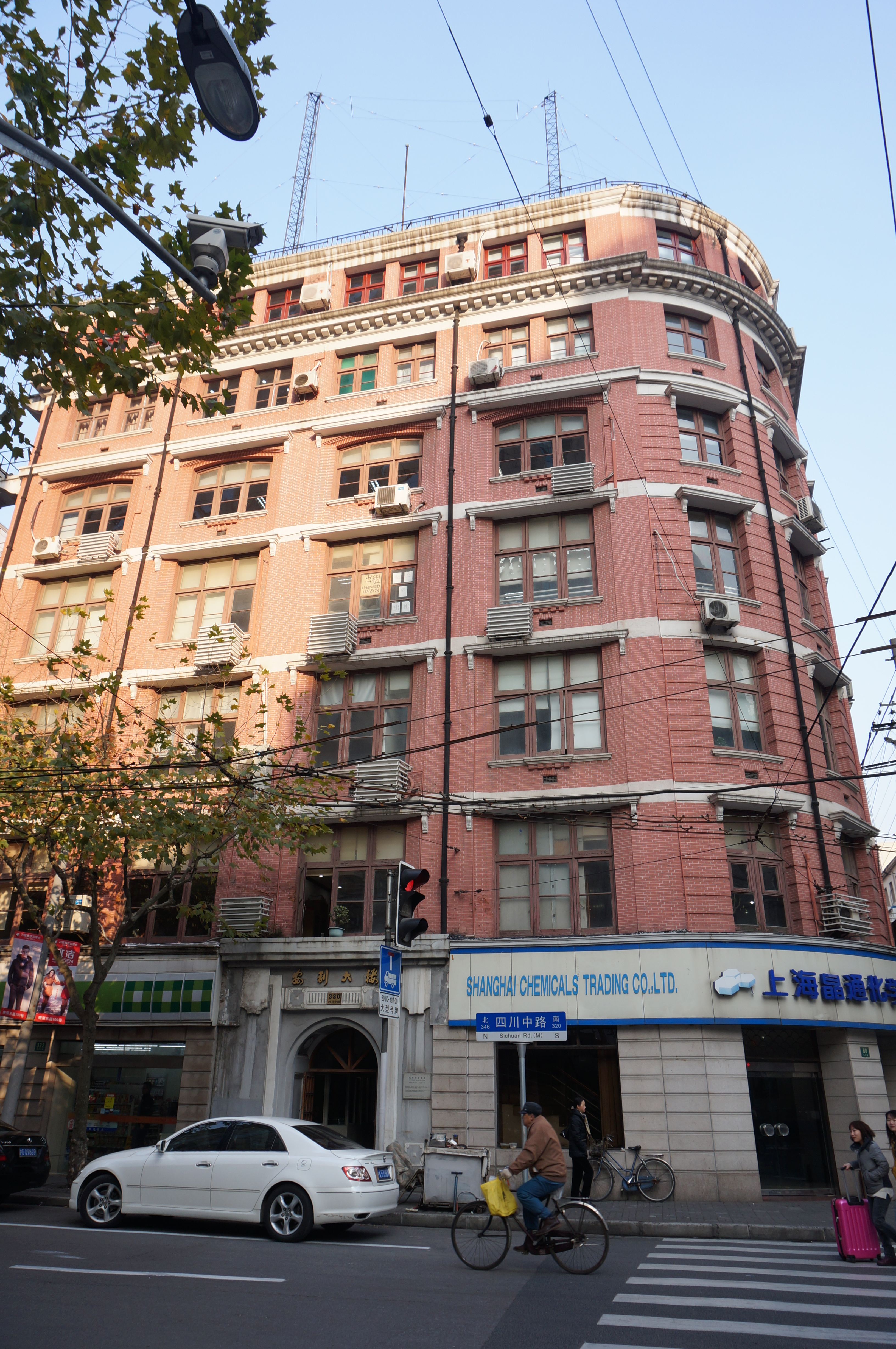 中文（中国大陆）: 上海安利洋行